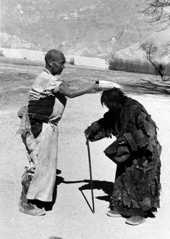 Lhasa, professioneller Bauchrutscher